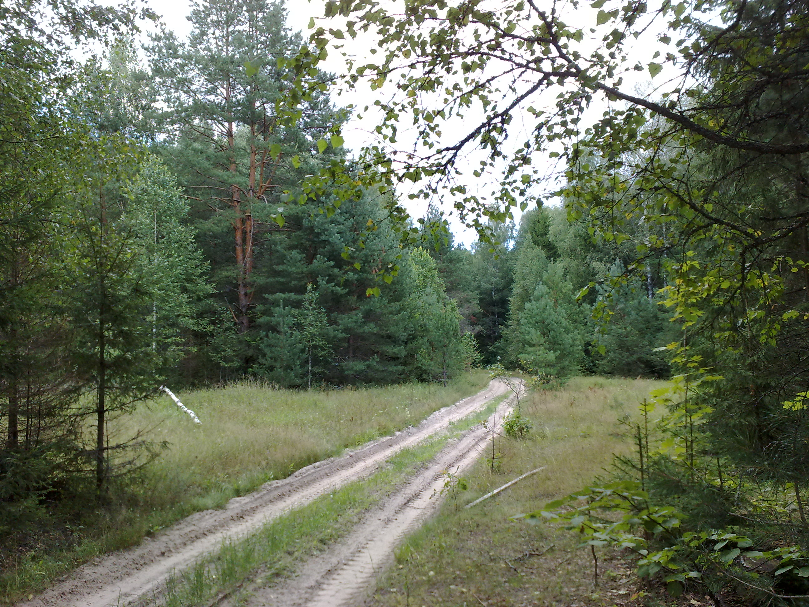 Круглое поле